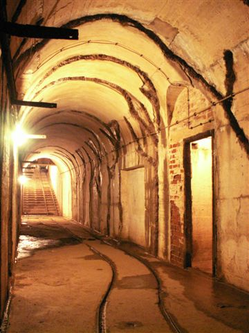 Hlavní (dělostřelecká) galerie v dělostřelecké tvrzi Bouda u minového zařízení